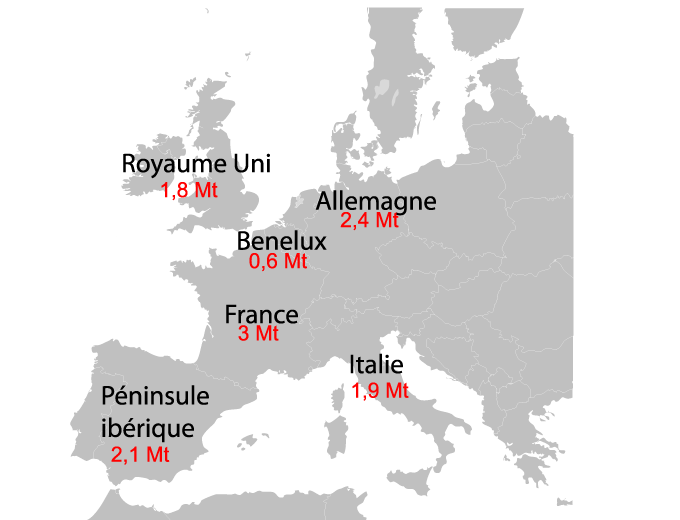 Distribution de la consommation de bitume à usage routier en Europe en 2006 (d’après European Asphalt Pavement Association (EAPA))